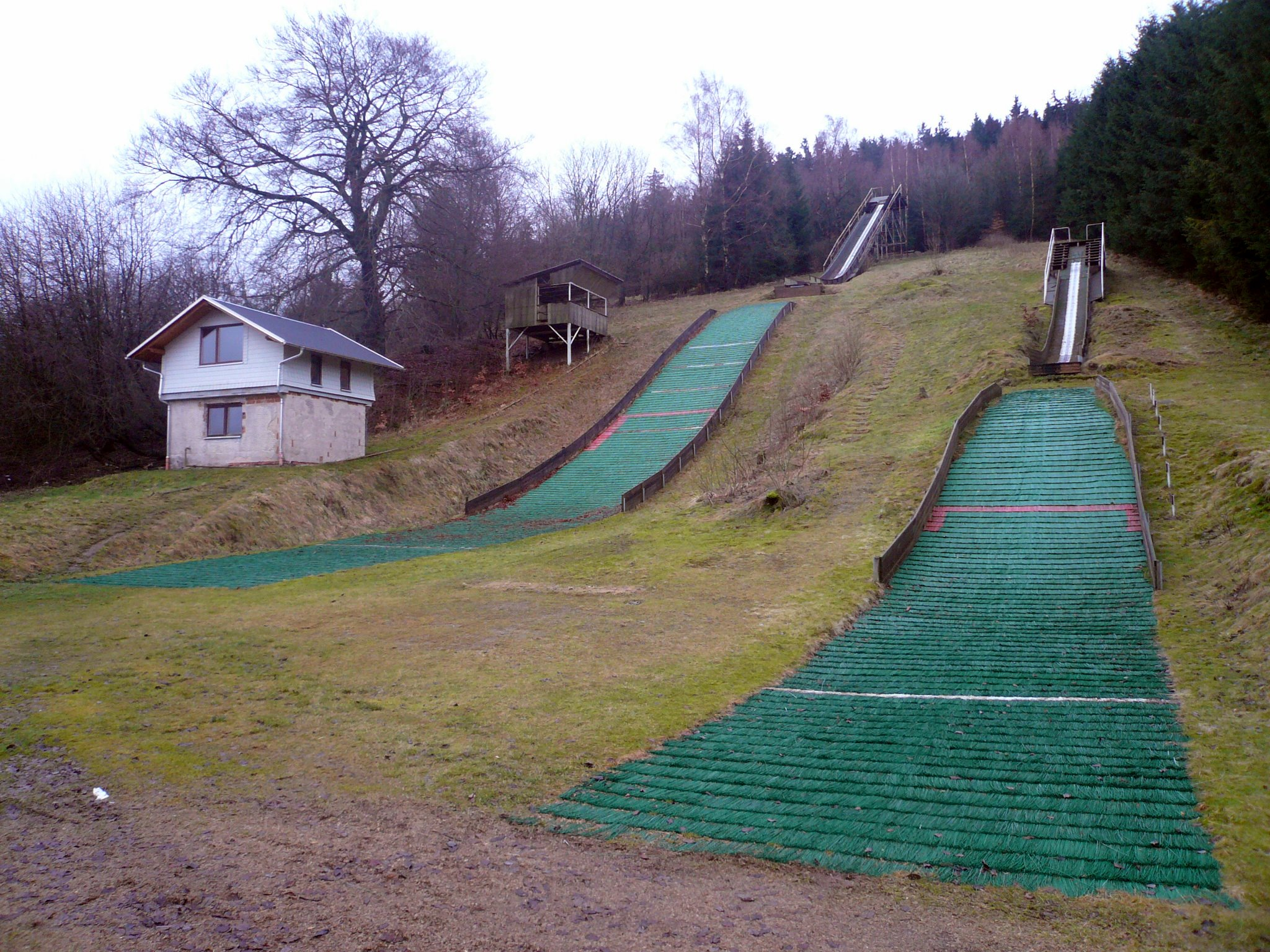 Blick auf die Oskar-Fuchs-Mattenschanze (Am Seimberg, Brotterode). Die Schanzenanlage wurde im Jahr 2009 komplett abgerissen.